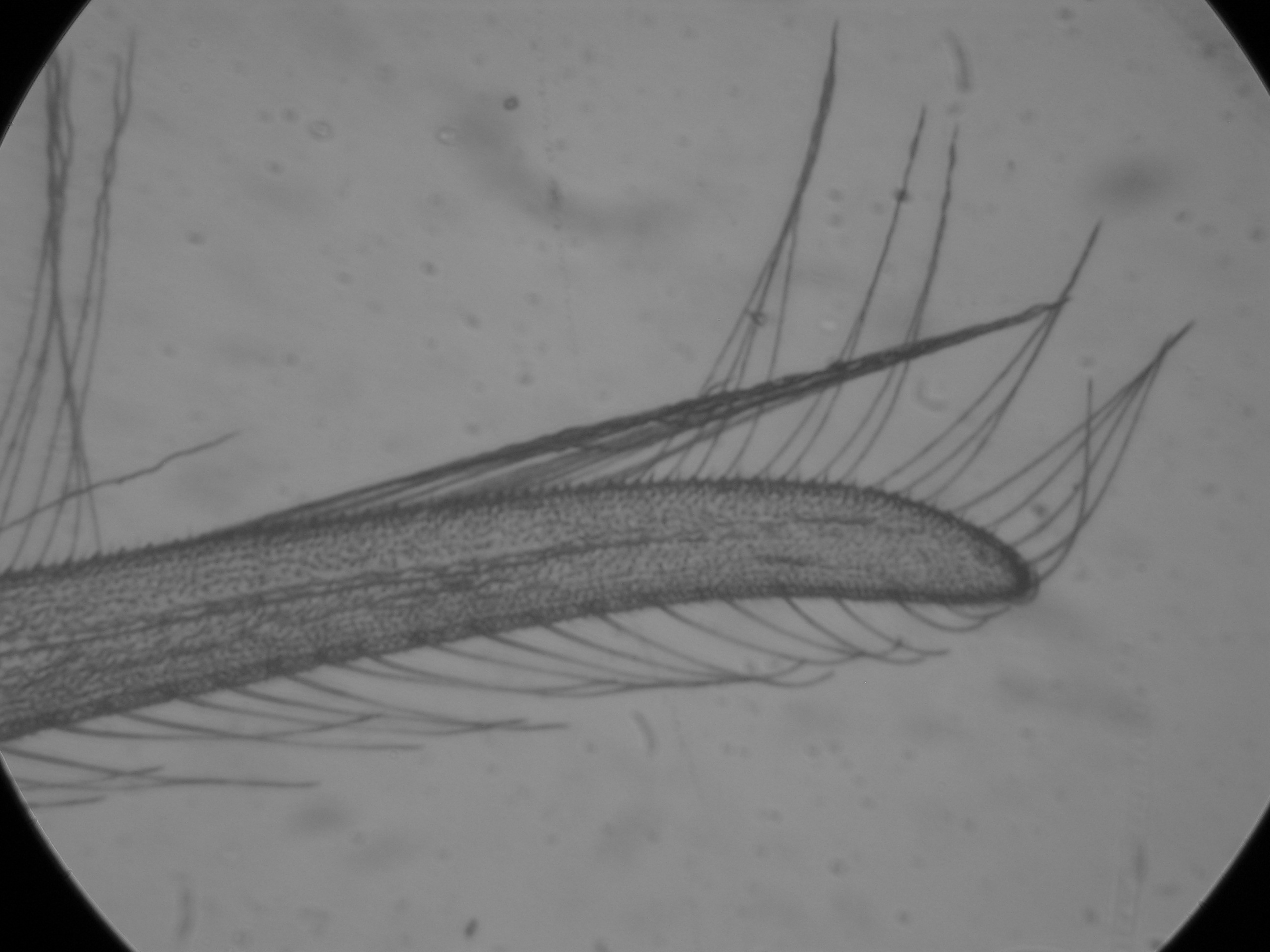 Thysanoptera-Flügel mit angelegten und aufgestellten Fransen